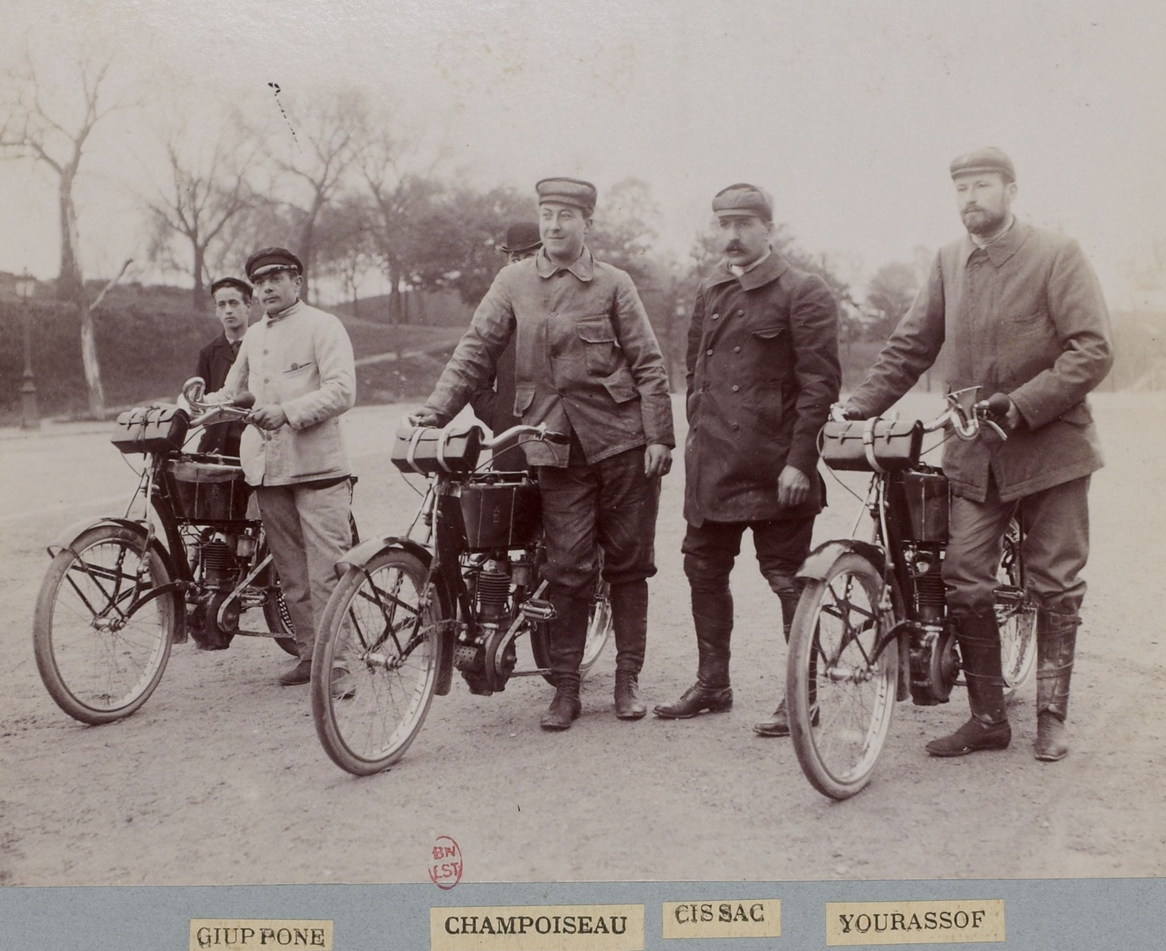 [Collection Jules Beau. Photographie sportive] : T. 29. AnnÃ©e 1905 / Jules Beau : F. 32v. [Tour de France pour motocyclettes, Paris - Dijon - Saint-Etienne - Avignon - Marseille - NÃ®mes - Toulouse - Limonges - OrlÃ©ans - Paris, organisÃ© par l' Autocycle Club de France et Les Sports, 6 - 14 mai 1905]